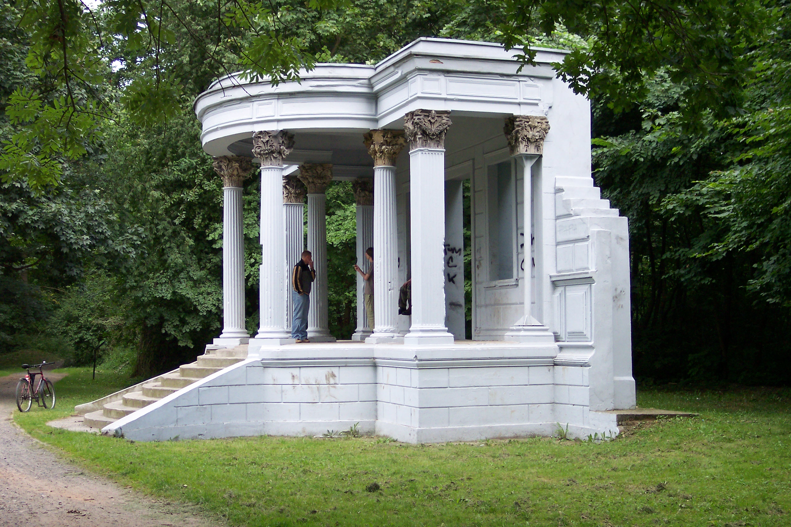 Pozostałość po pałacu w parku zabytkowym w Sławięcicach (Kędzierzyn-Koźle)